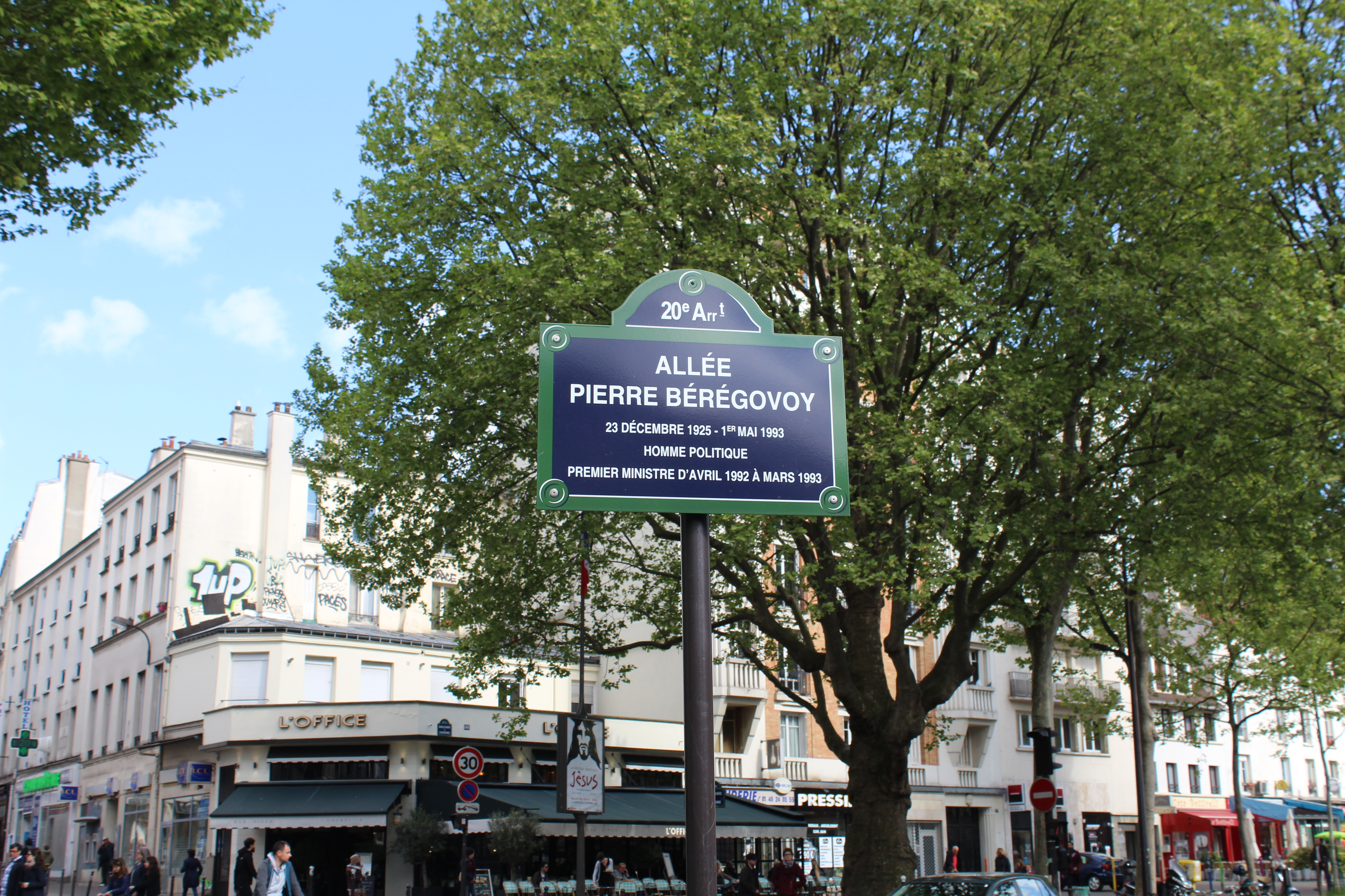 Plaque de l'allée Pierre-Bérégovoy, Paris.